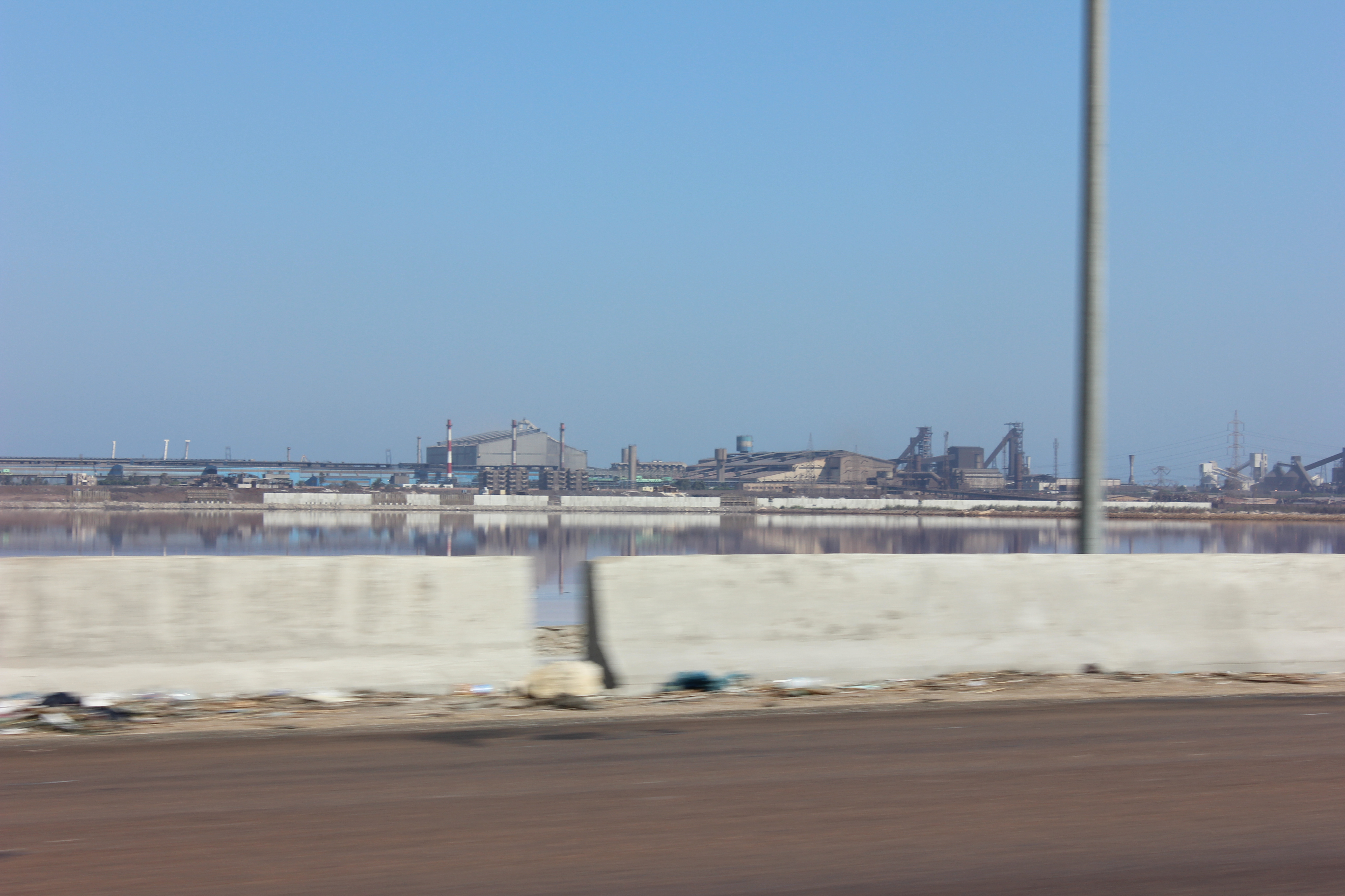 الطريق الدولي الساحلي بالإسكندرية.